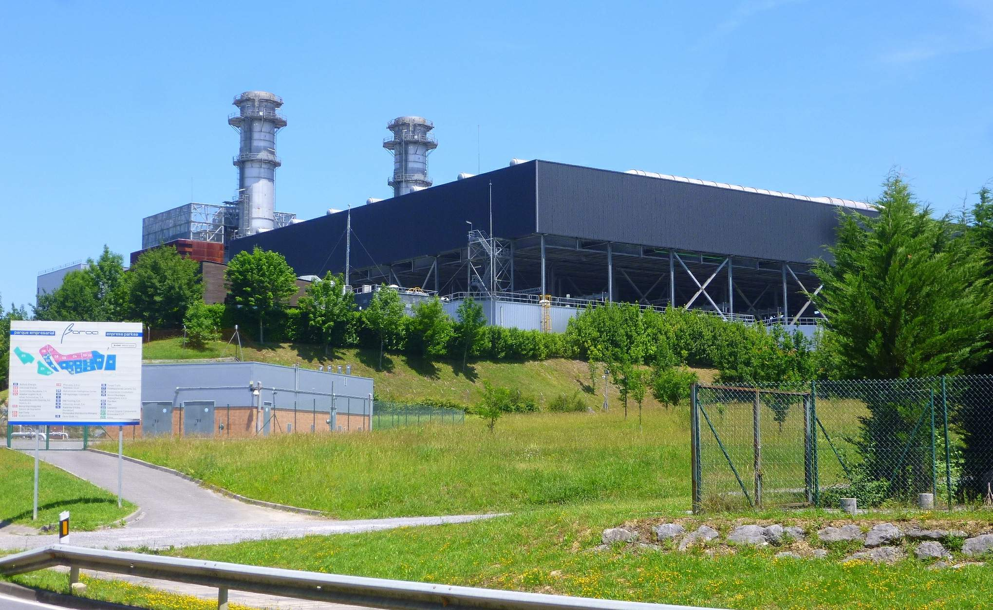 Central Térmica (Bizkaia Energia), en el Parque Empresarial Boroa (Amorebieta, Vizcaya)